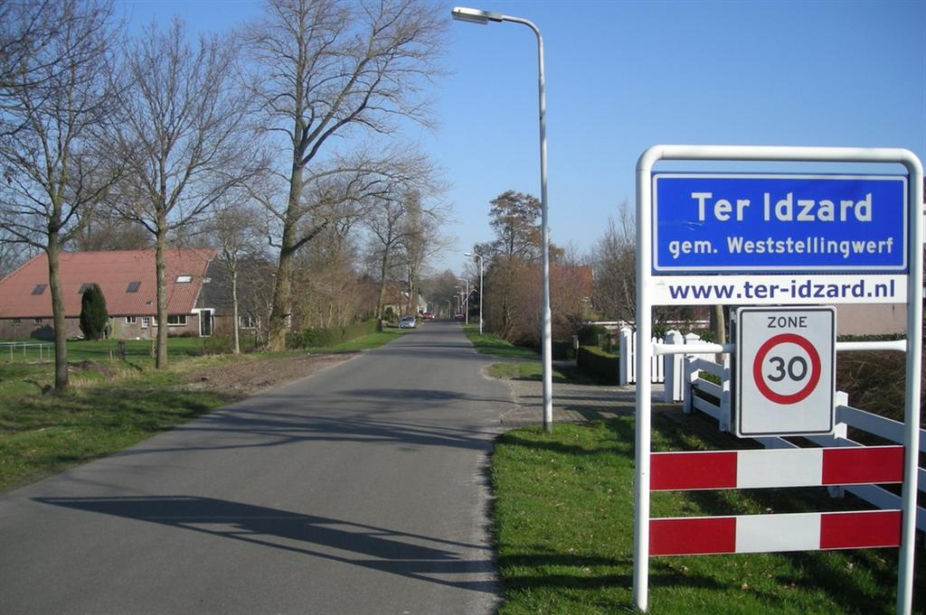 Ter Idzard